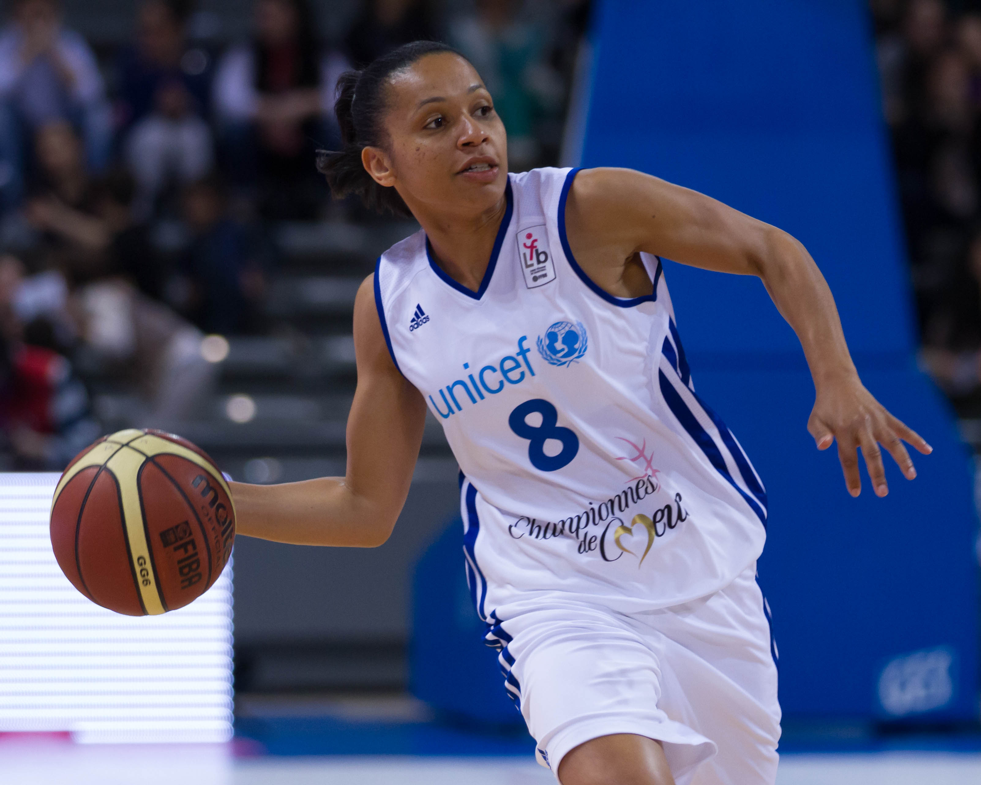 Edwige Lawson-Wade, match de gala championnes de cœur